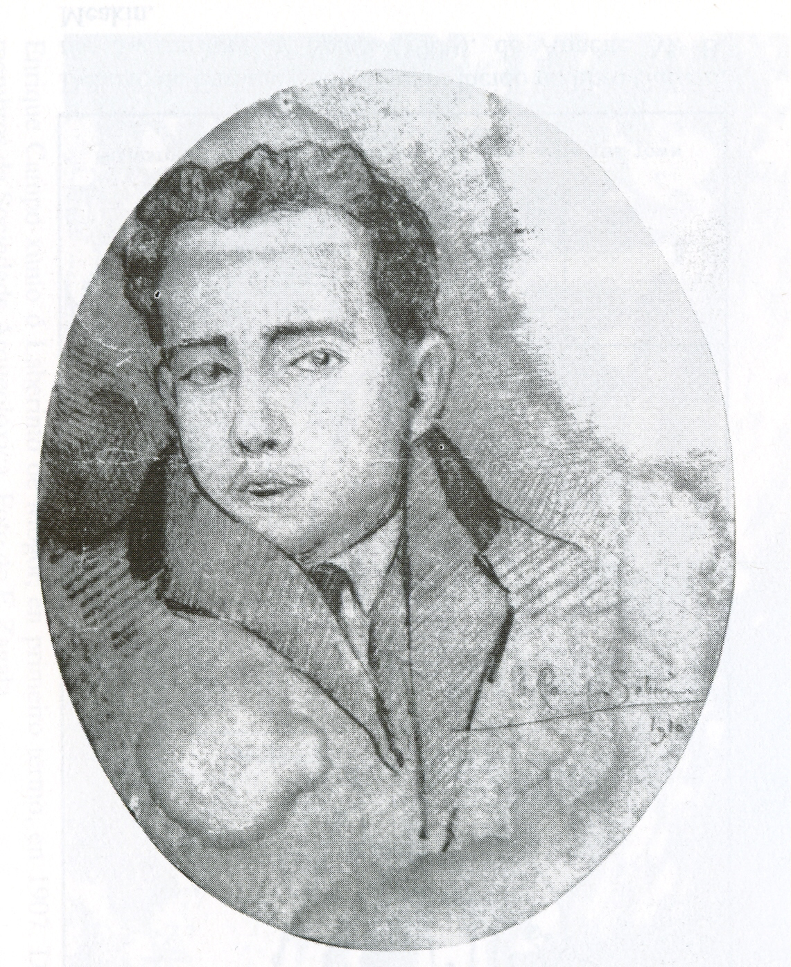 Rretrato de Ramón Sobrino Buhígas, a lapis por Henrique Campo. Madrid. 1910